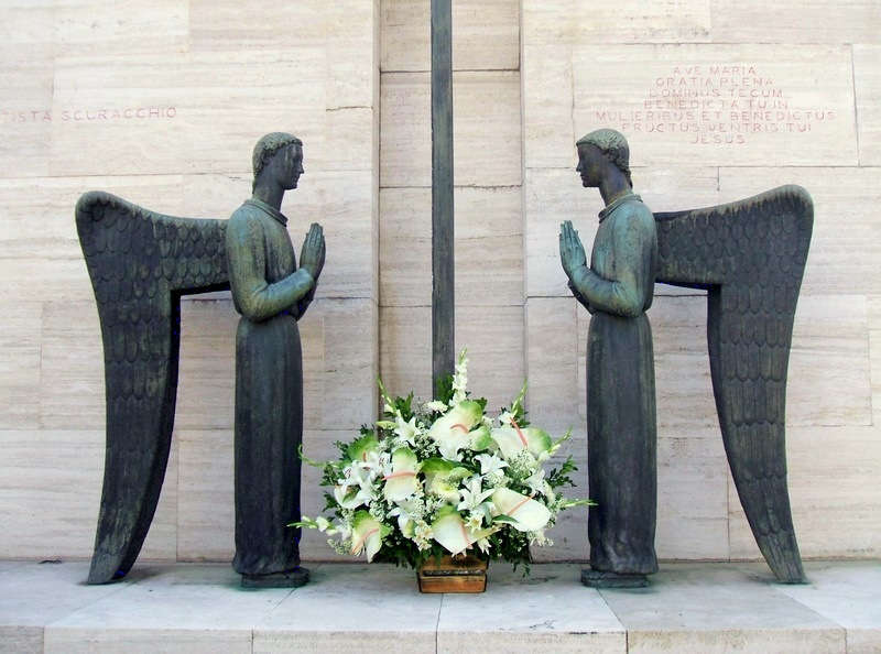 Victor Brecheret (1894-1955) - Ave Maria (Túmulo da Família Scuracchio). Necrópole São Paulo (São Paulo, Brasil)